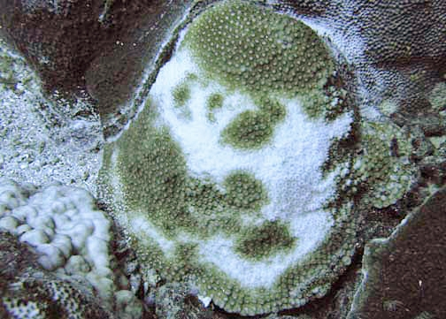 Goniastrea stelligera, afectada por blanqueo parcial de la colonia. Samoa Americana